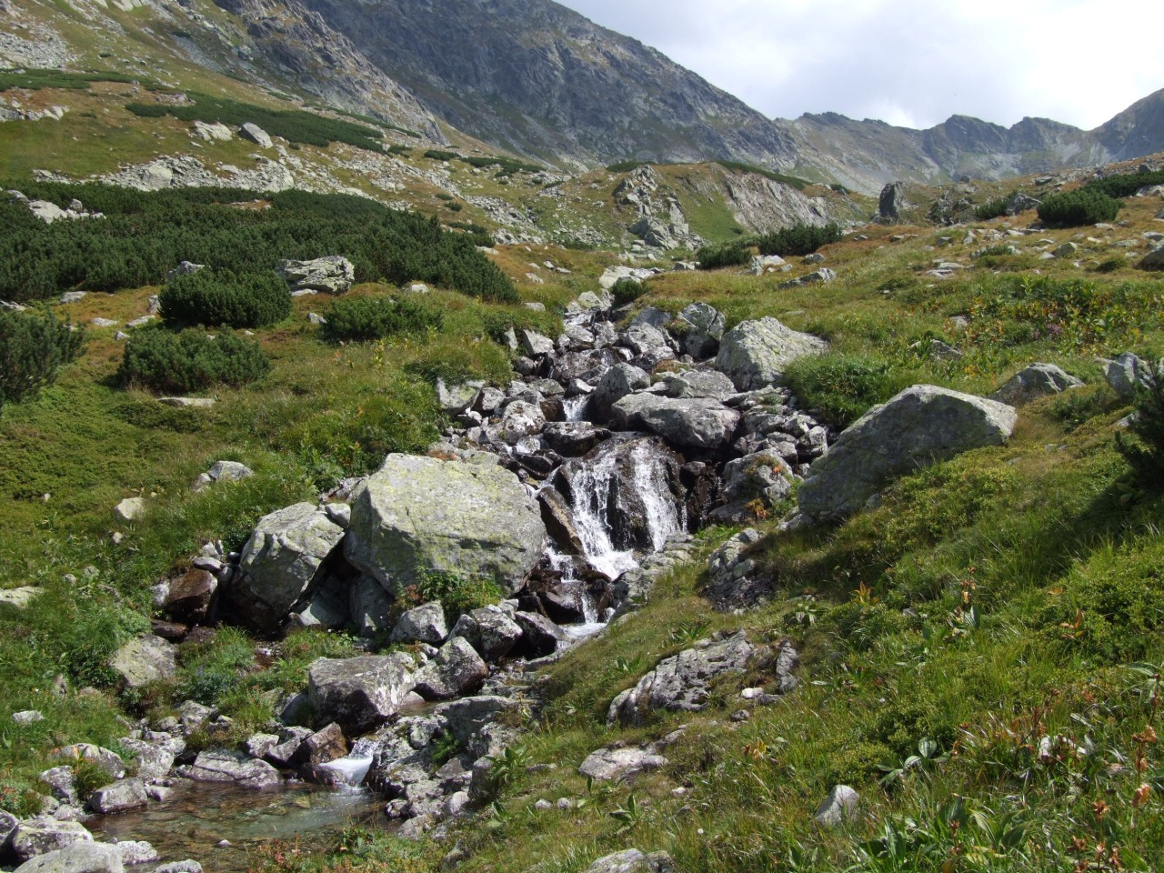 Hliński Potok